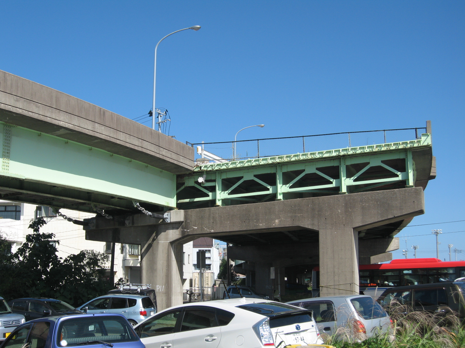 東港線バイパスの画像。